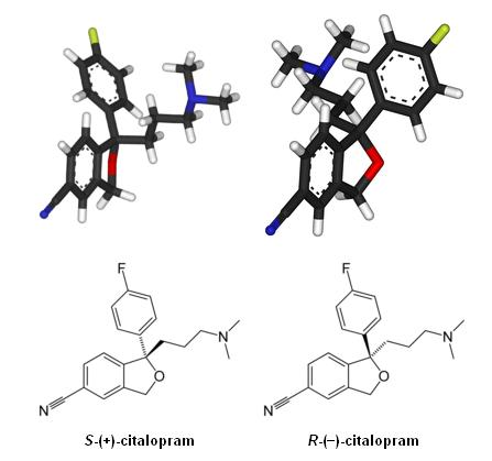 שני האננטימרים של ציטלופרם